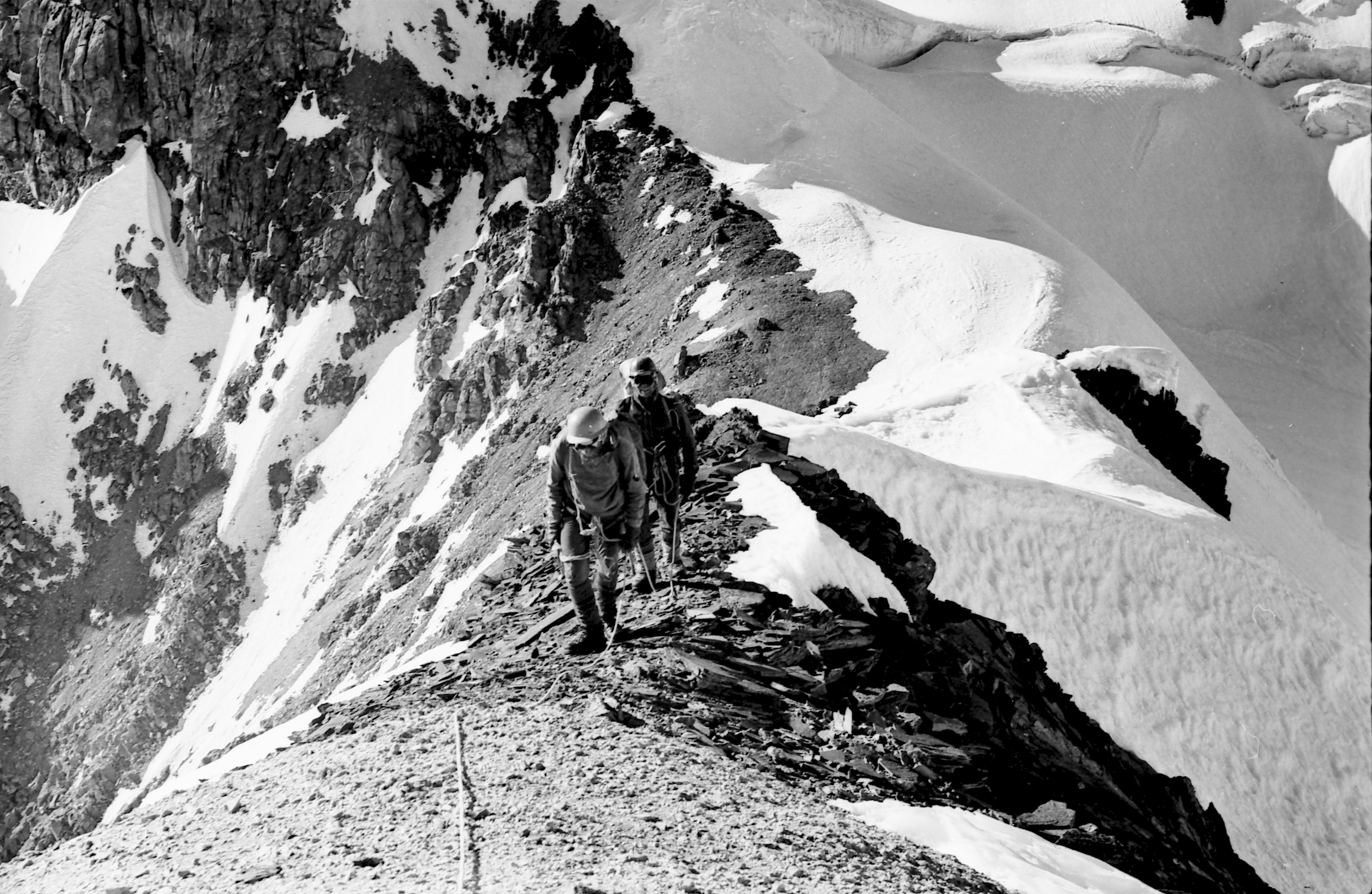 Ekspeditsioon mäetipule "Tartu Ülikool 350". Ülikooli mäetipu harjal.